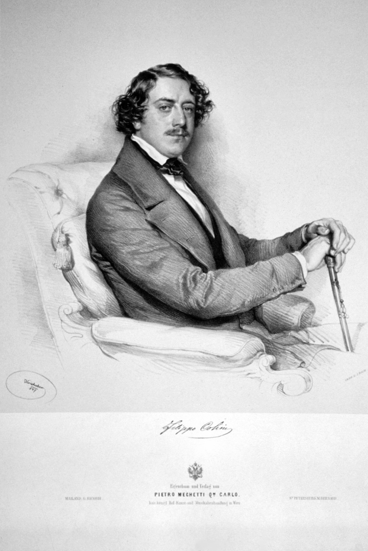 Filippo Colini (1811-1863), italienischer Opernsänger (Bariton) Lithographie von Josef Kriehuber, 1847